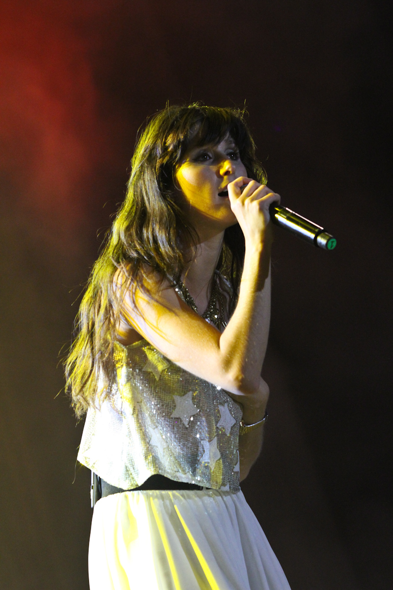 Francisca Valenzuela en Antofagasta, 2012.